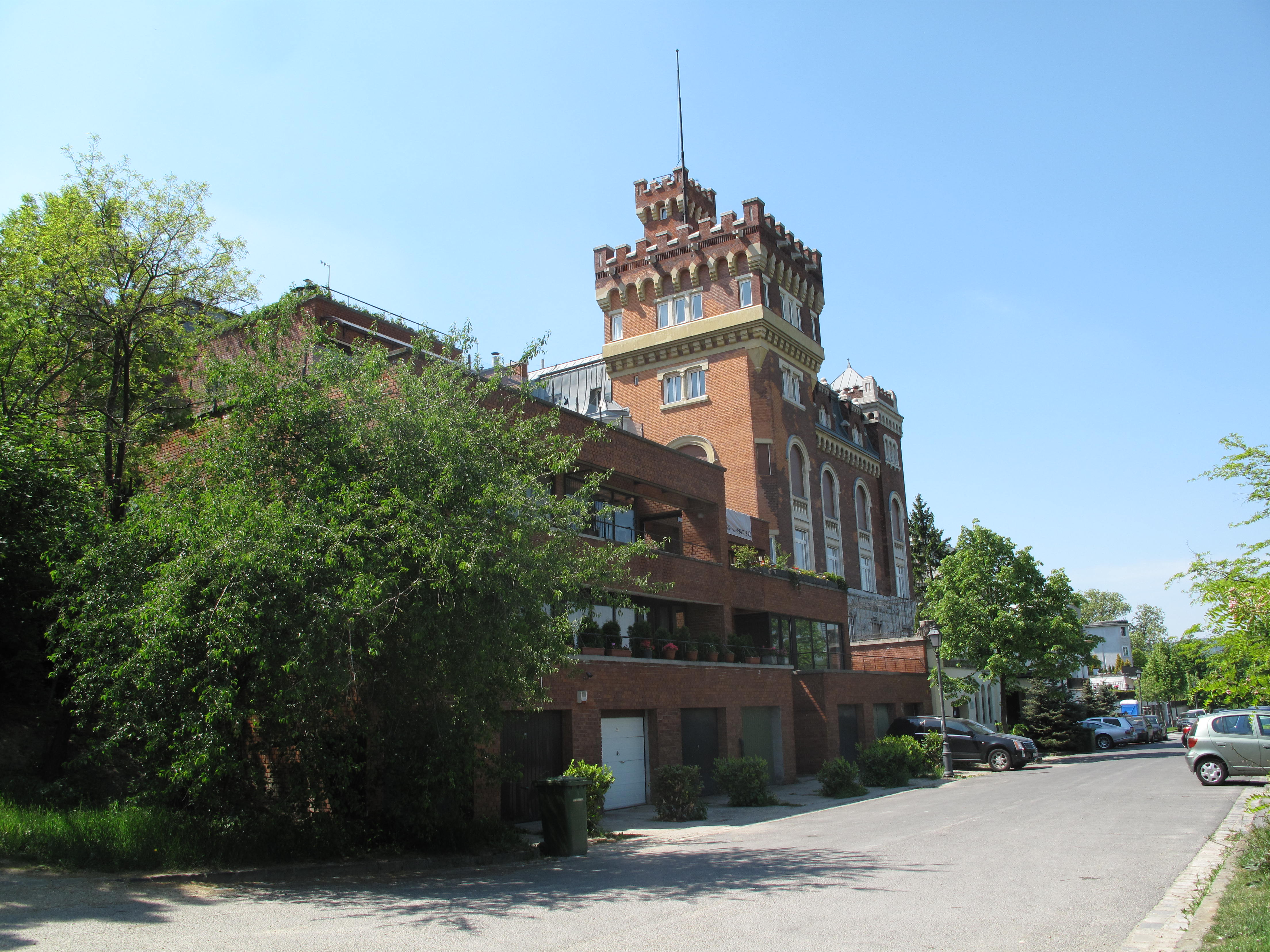 Budapešť